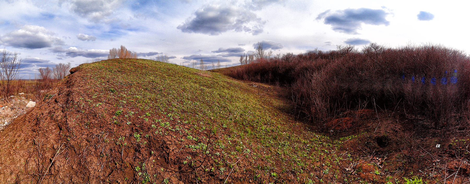 март 2015